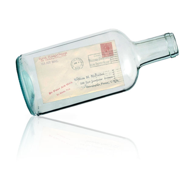 自行製作（使用維基共享資源中File:Empty_bottle.jpg以及File:Cover_Bahamas_1929_front.jpg製作）